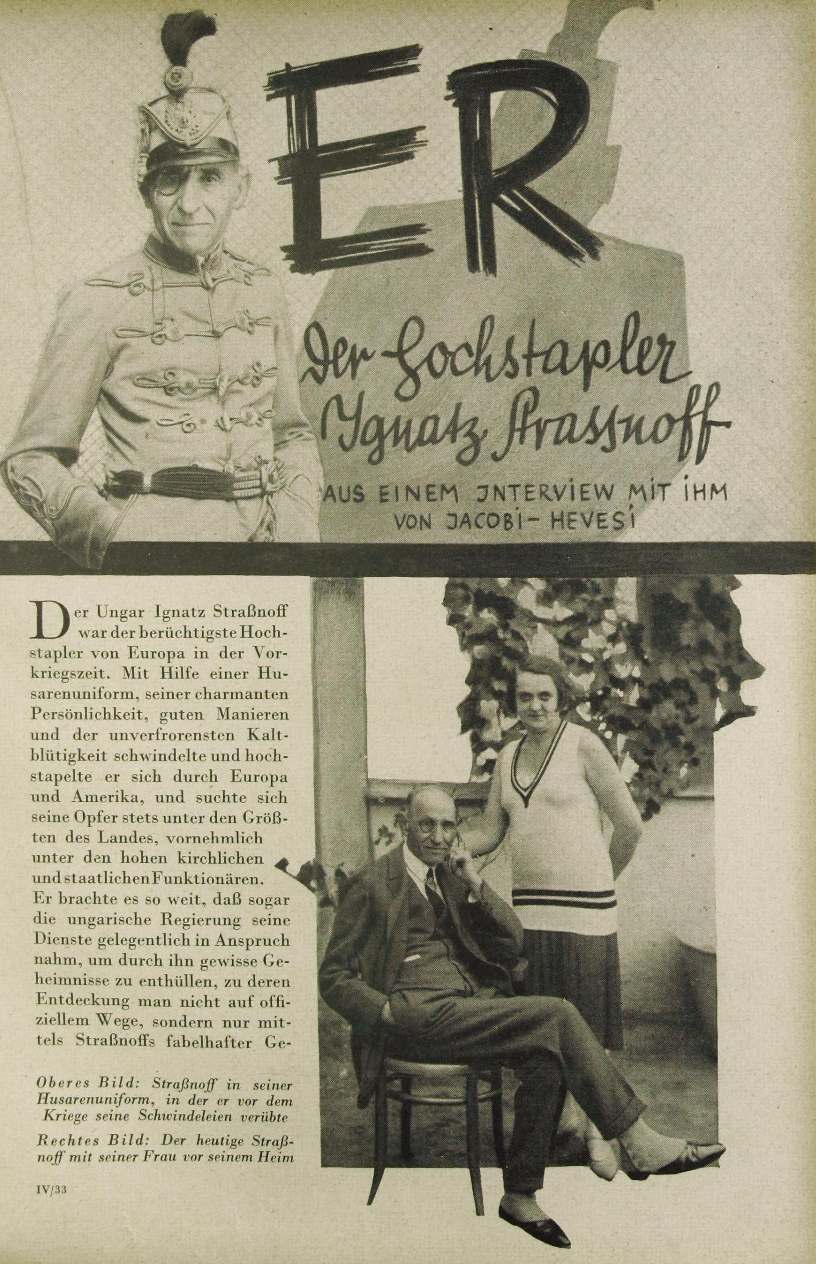 Cikk és illusztráció Strasznof Ignácról , a híres magyar kalandorról és szélhámosról